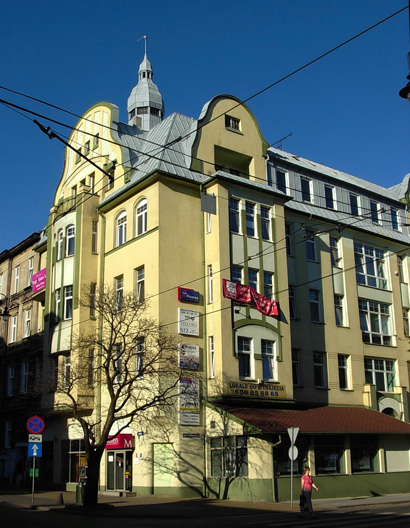 Kamienica ul. Słowackiego 1 w Bydgoszczy